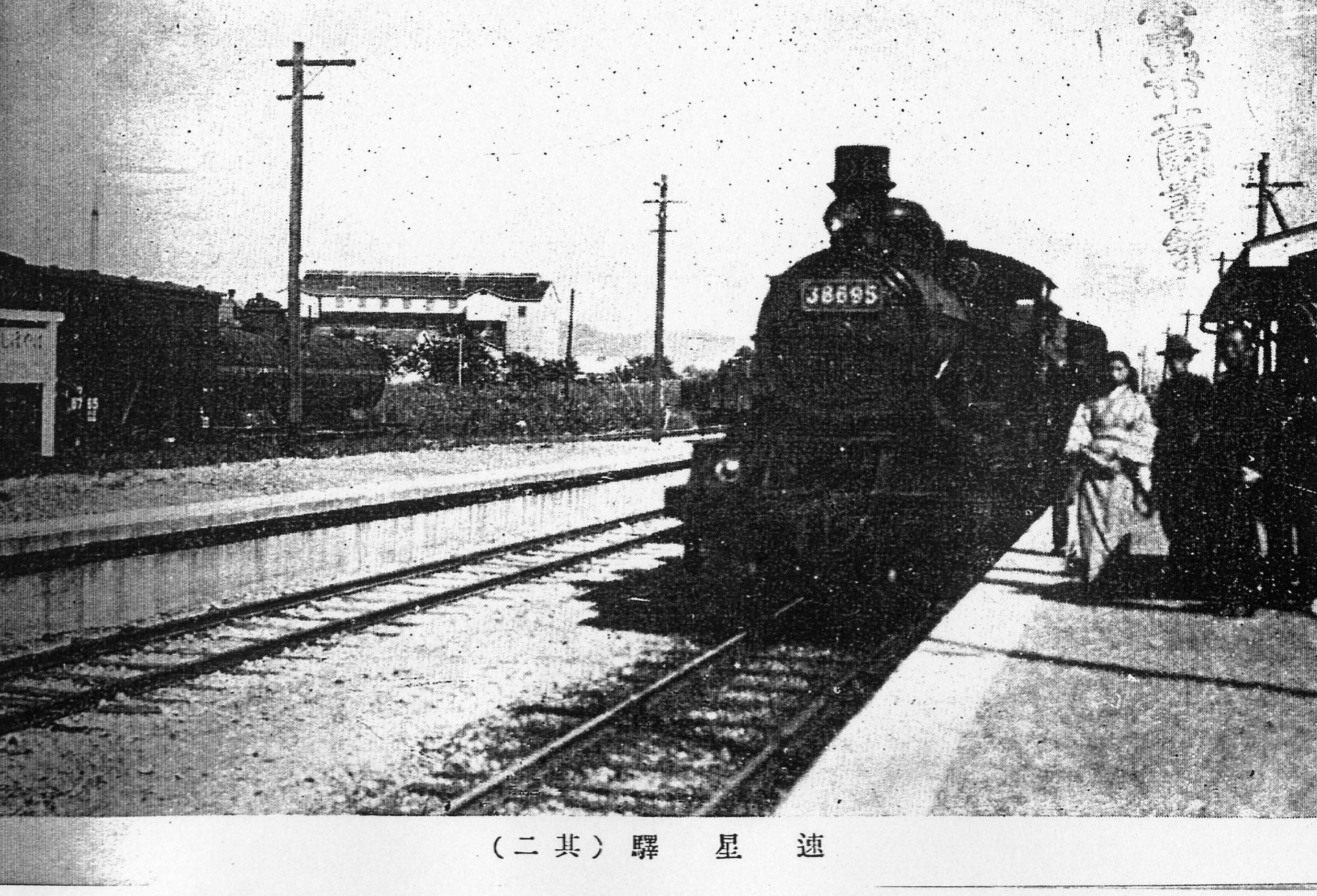 飛越線速星駅ホーム